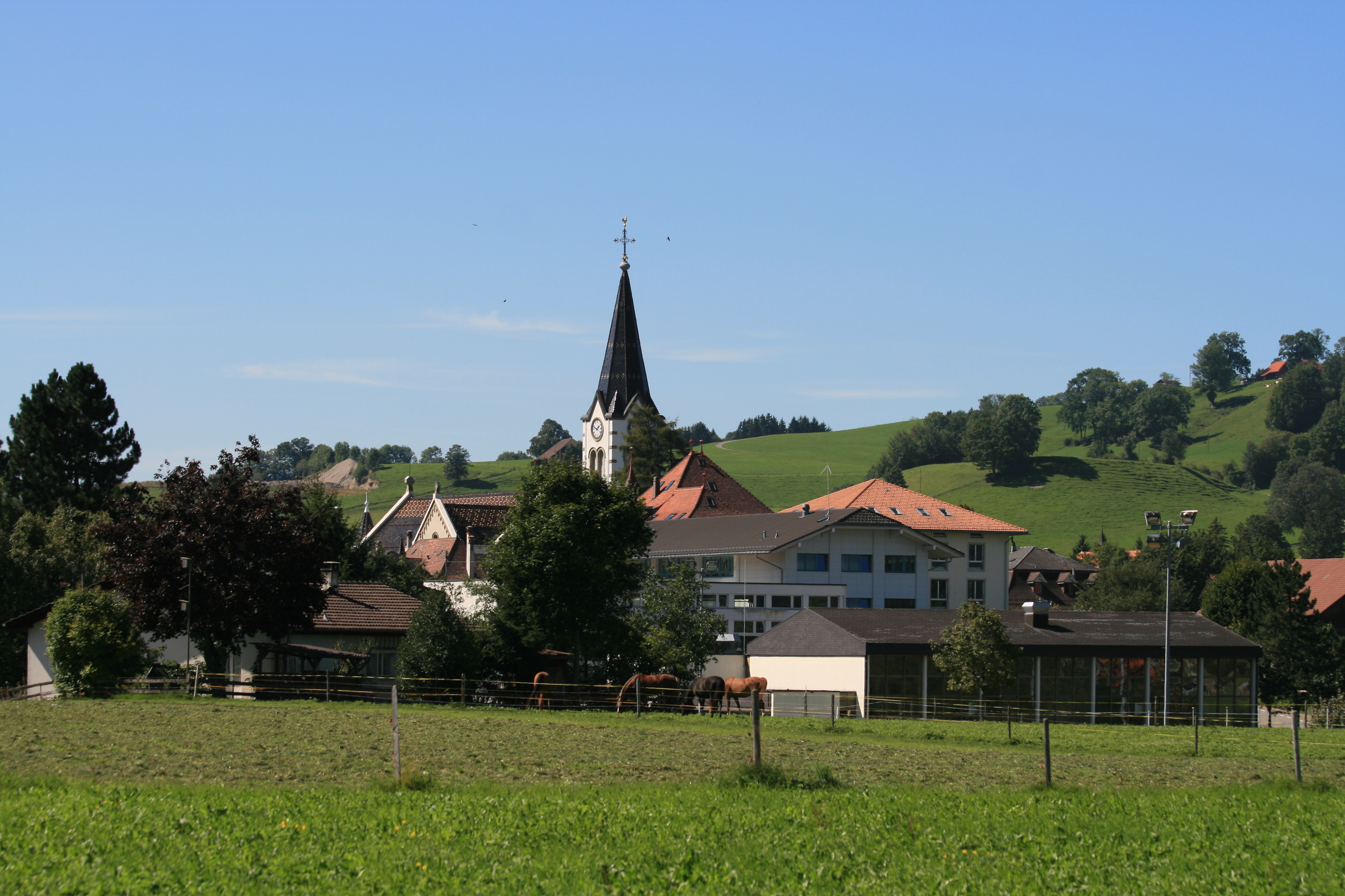 Blick auf das Dorf Plaffeien, Kanton Freiburg, Schweiz